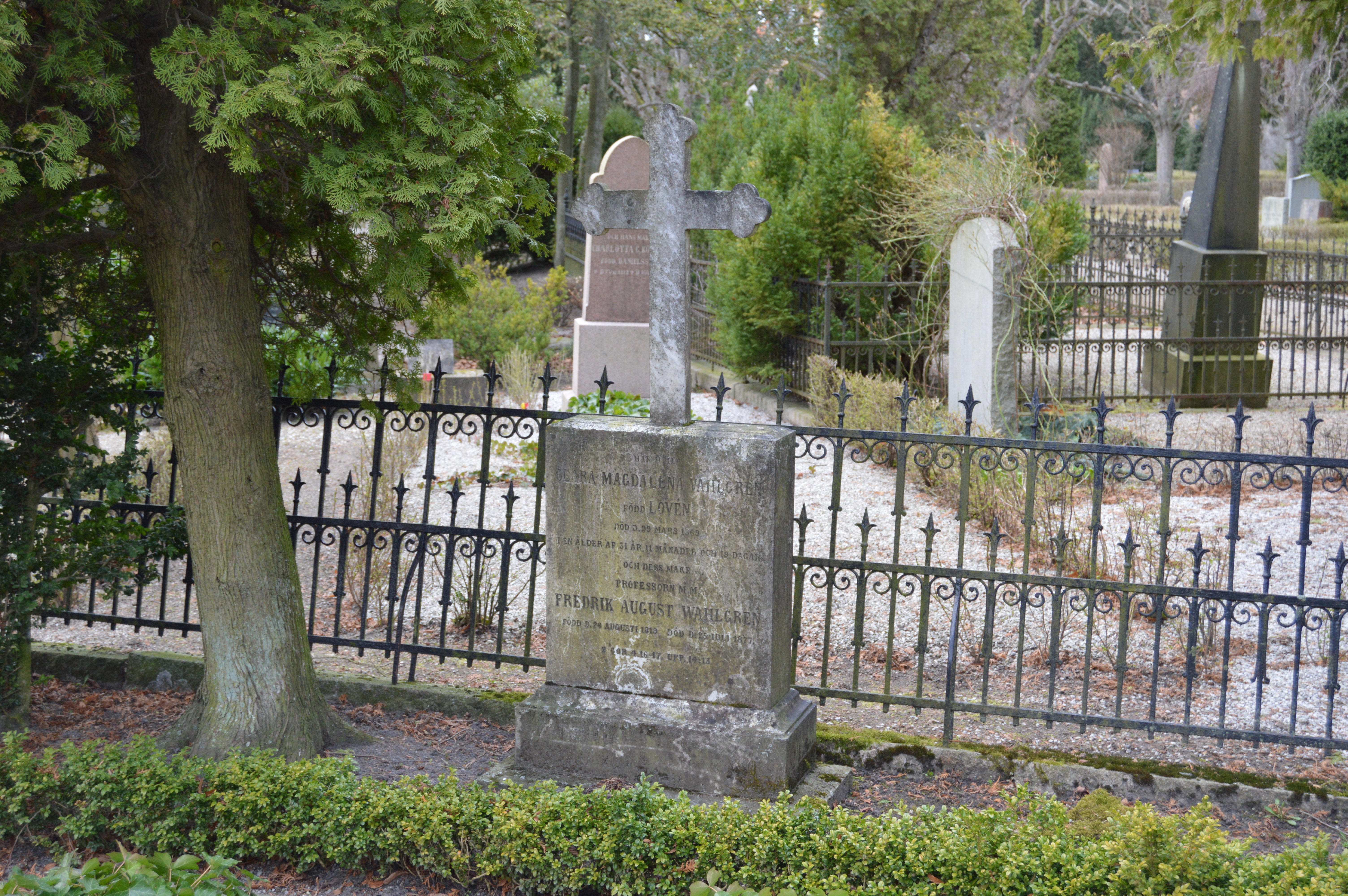 Clara Magdalena och Fredrik August Wahlgrens grav på Östra kyrkogården i Lund.